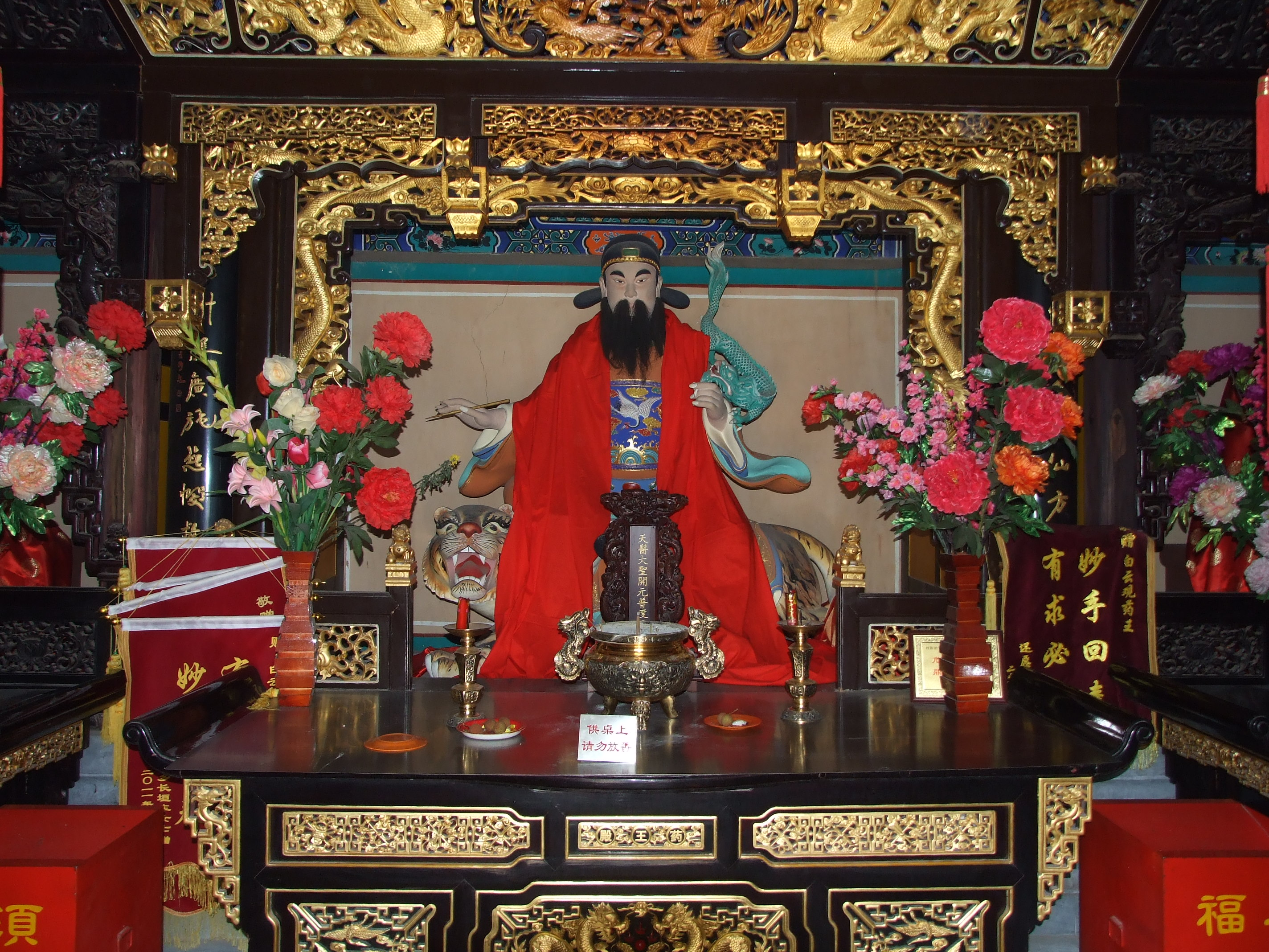 Sun Simiao, White Cloud Temple, Beijing